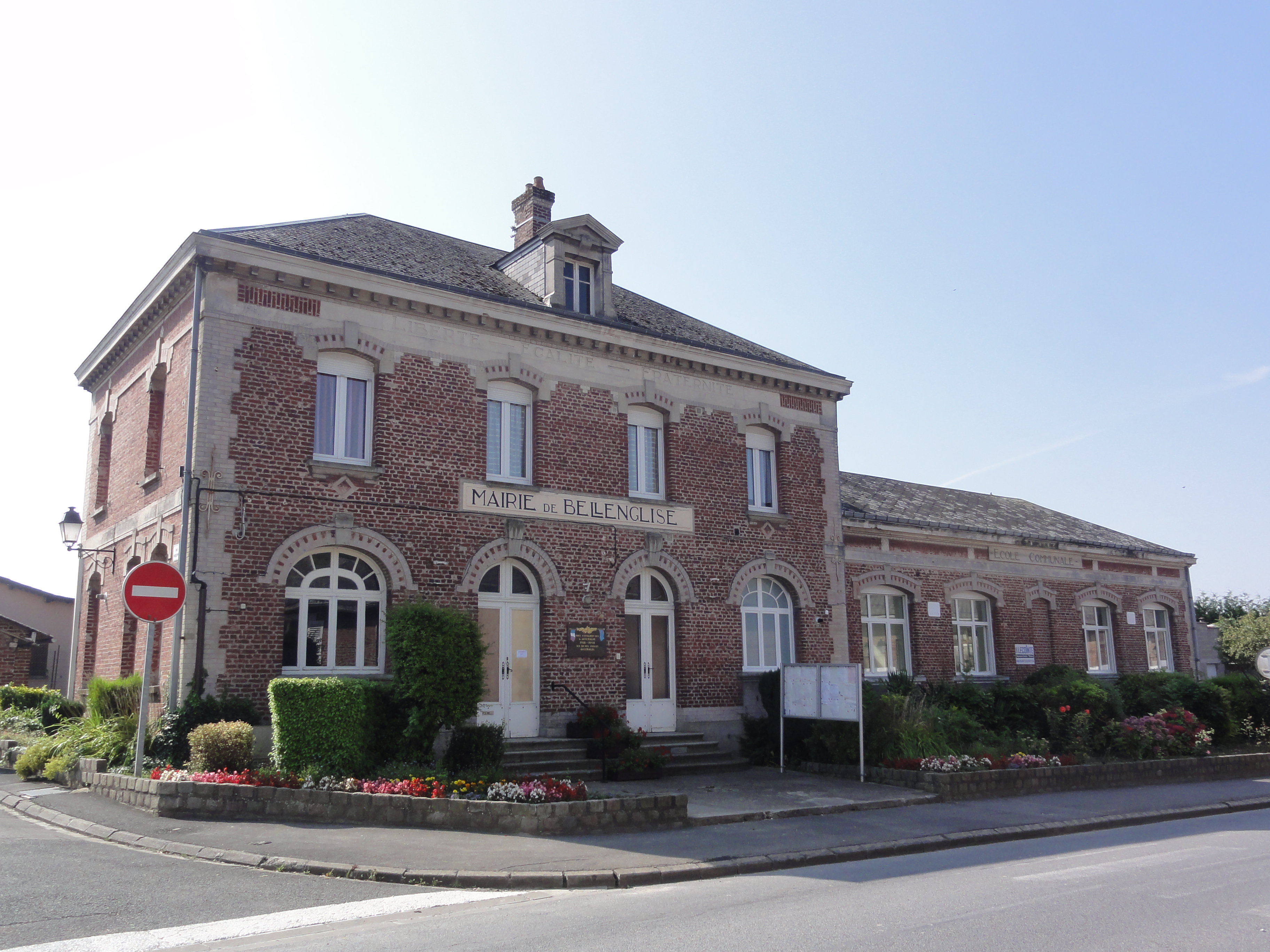 Bellenglise (Aisne) mairie et école